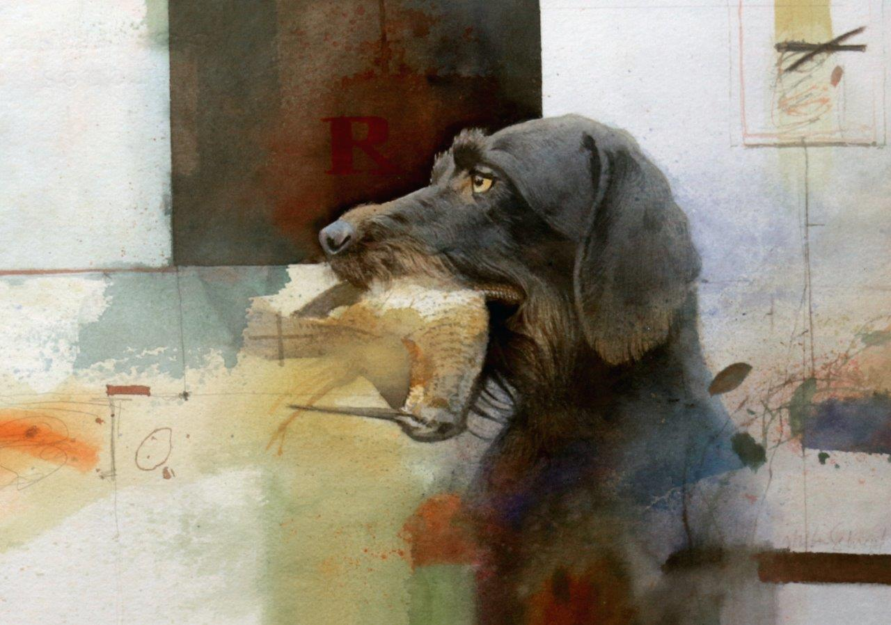 Willy Reichert, Stilrichtung Tierwelten